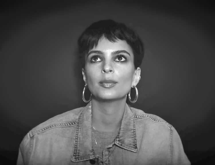 Emily Ratajkowski Behind The Scenes Of LOVE 18